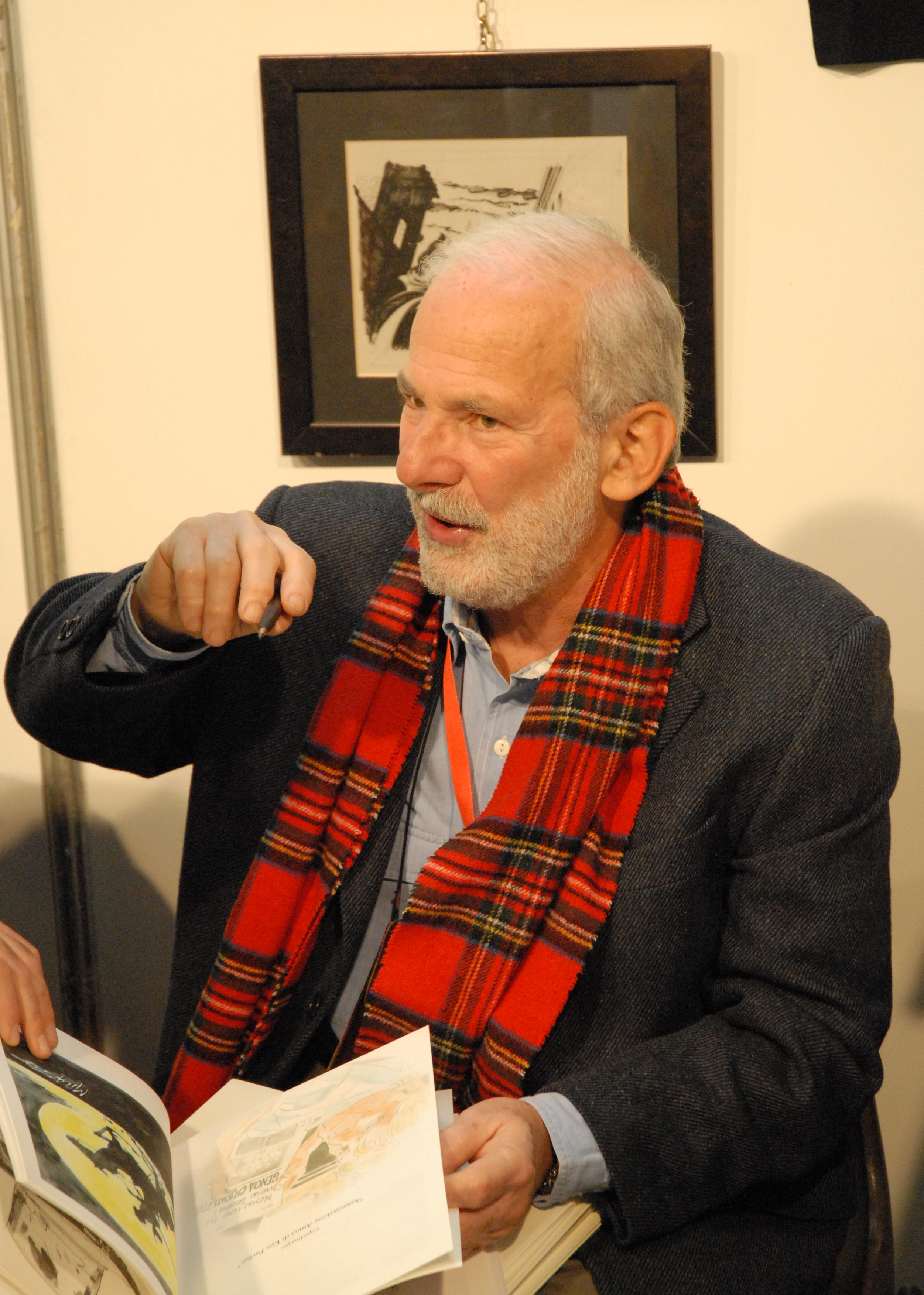 Vittorio Giardino Photo taken during Lucca Comics&Games 2010